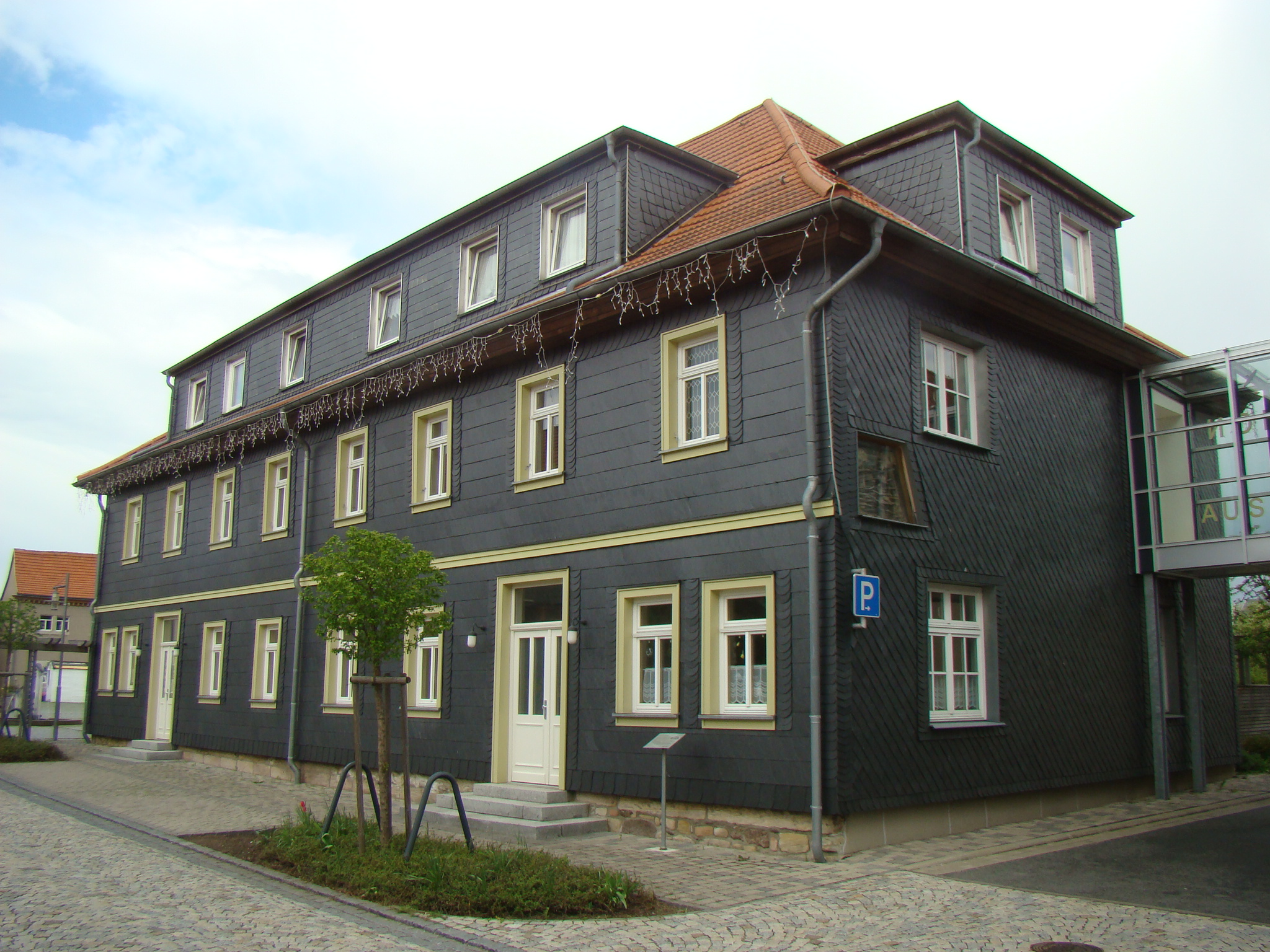 "Haus am Markt" in Langewiesen, am links von das Heinse-Haus (am rechts ausser das photo, andere seit das brucke uber der strasse).